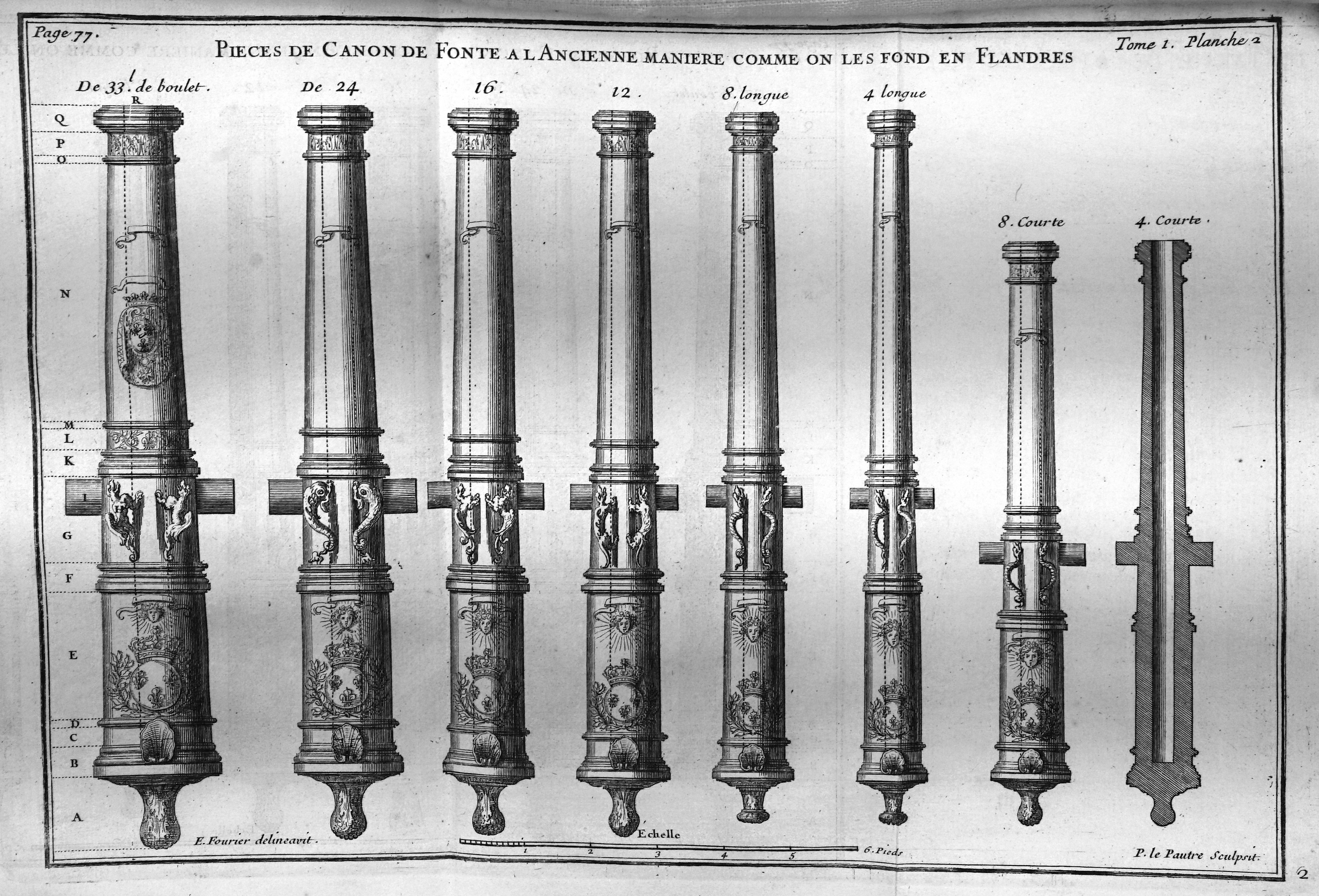 Mémoires d'artillerie, recueillis par M. Surirey de Saint Remy, exemplaire de la B.M. de Reims, troisième édition.